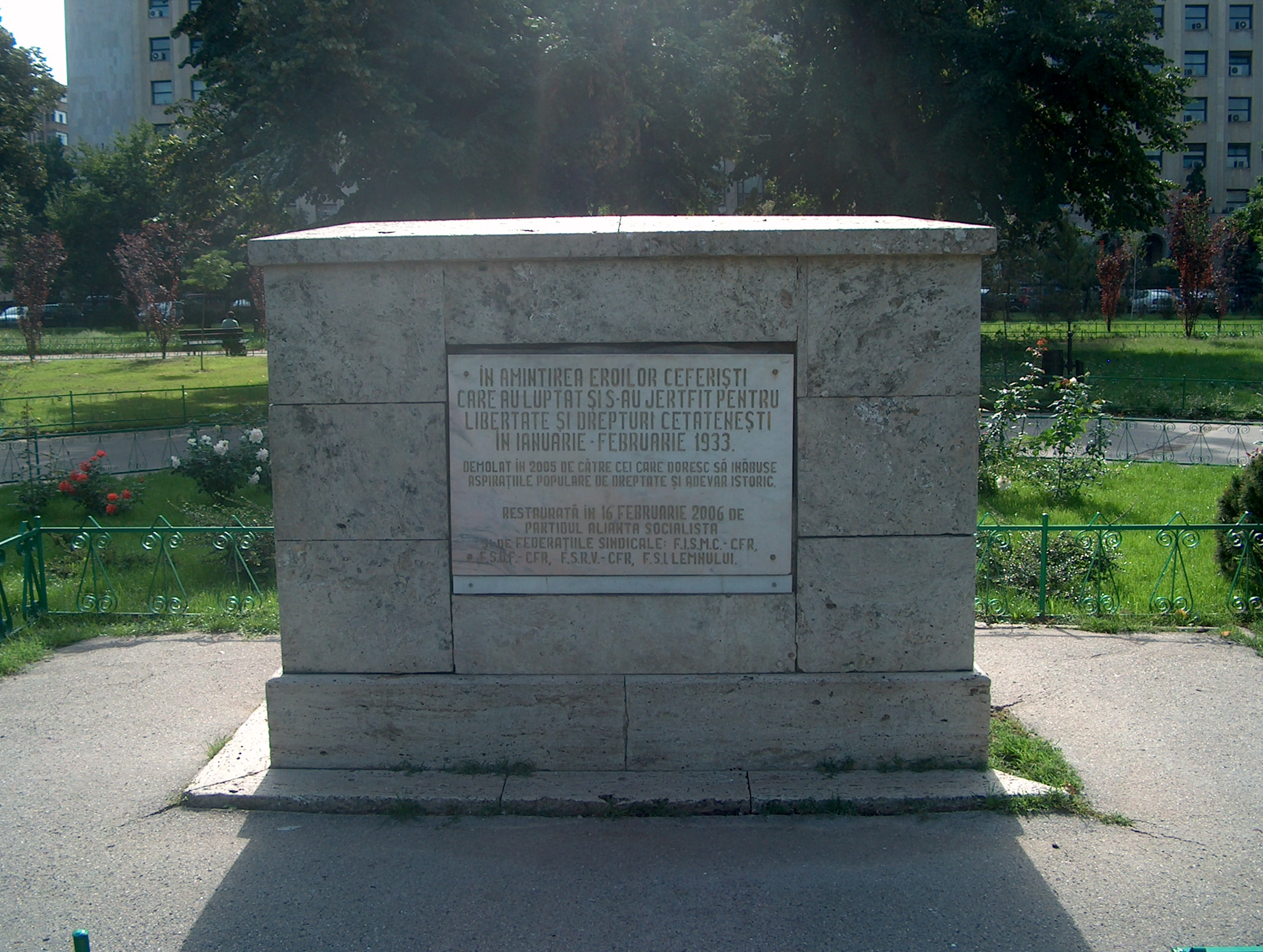 Monumentul din faţa Ministerului Transporturilor